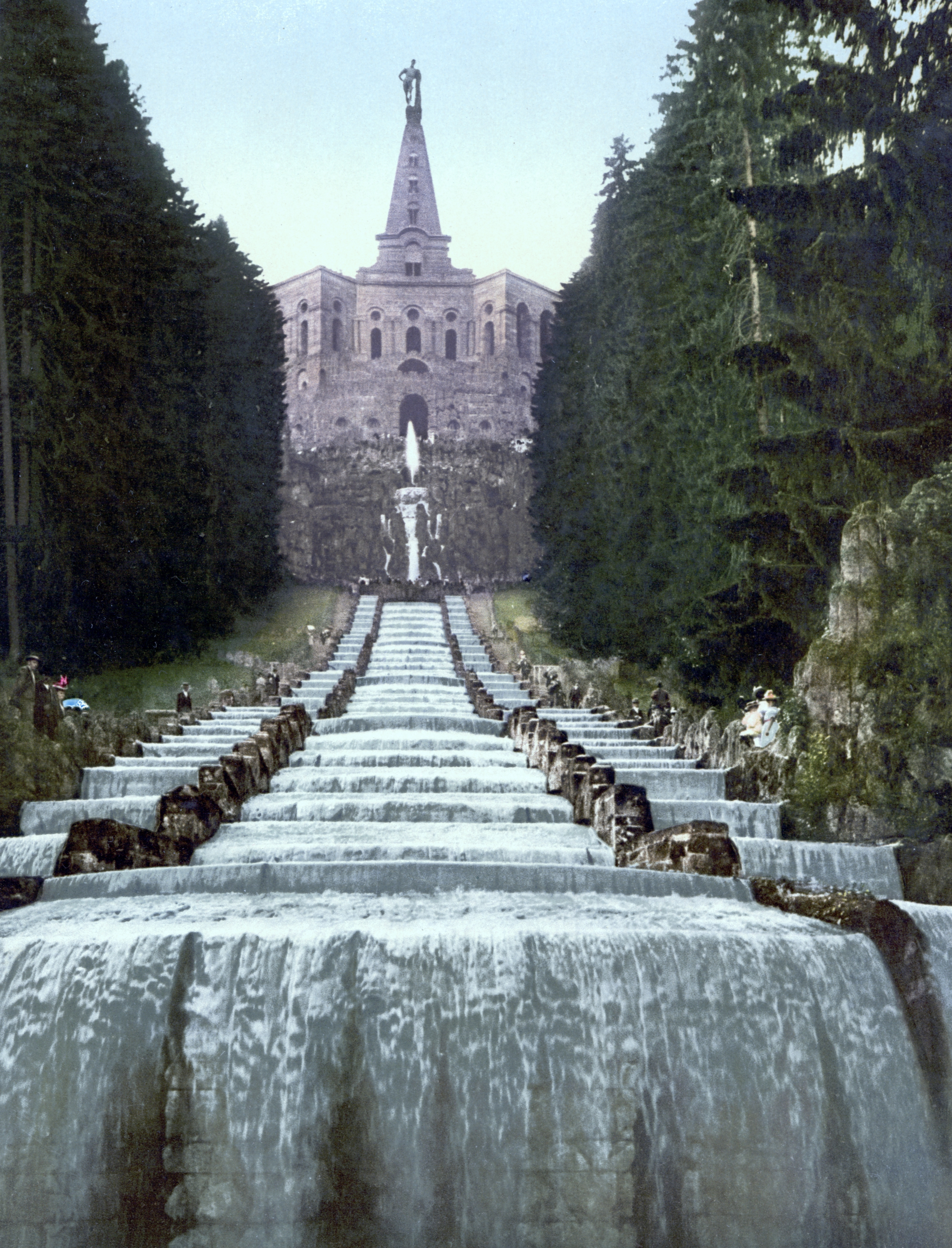 Kassel-Wilhelmshöhe, Herkules mit Kaskaden um 1900